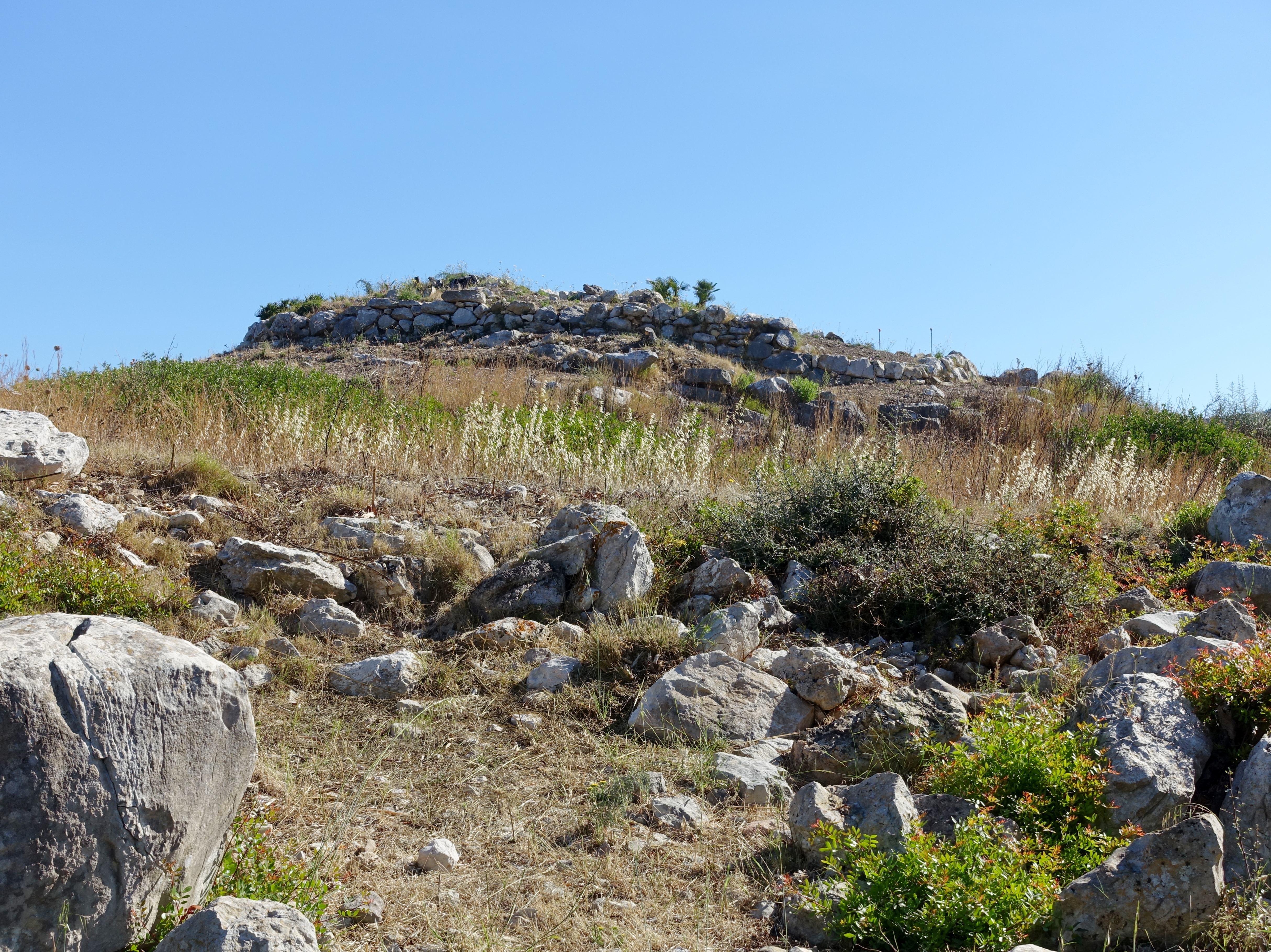 Ausgrabungsstätte Mestre Ramon, Gemeinde Son Servera, Mallorca, Spanien